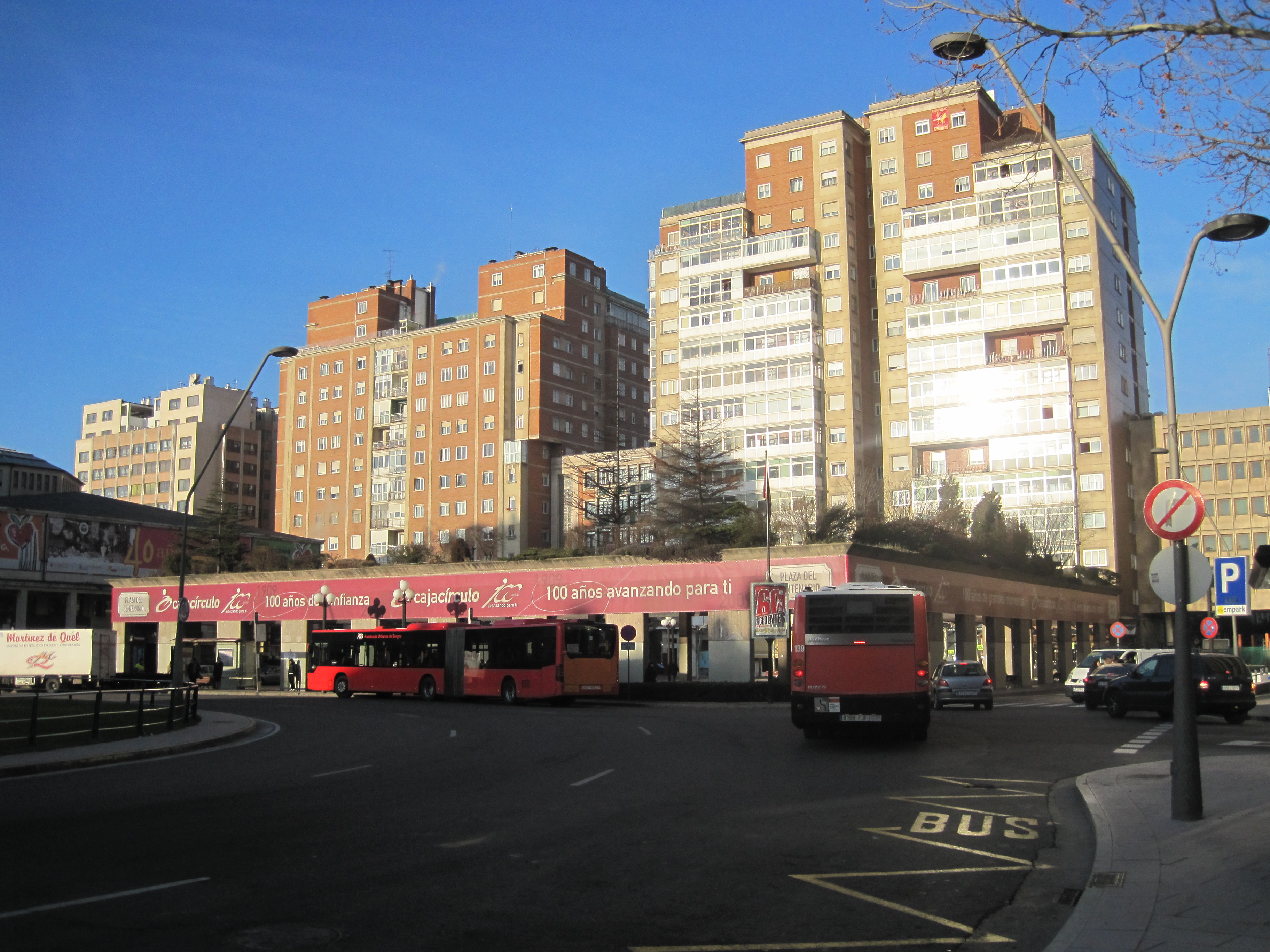 Plaza España, vista de Edificio Feygon y buses.